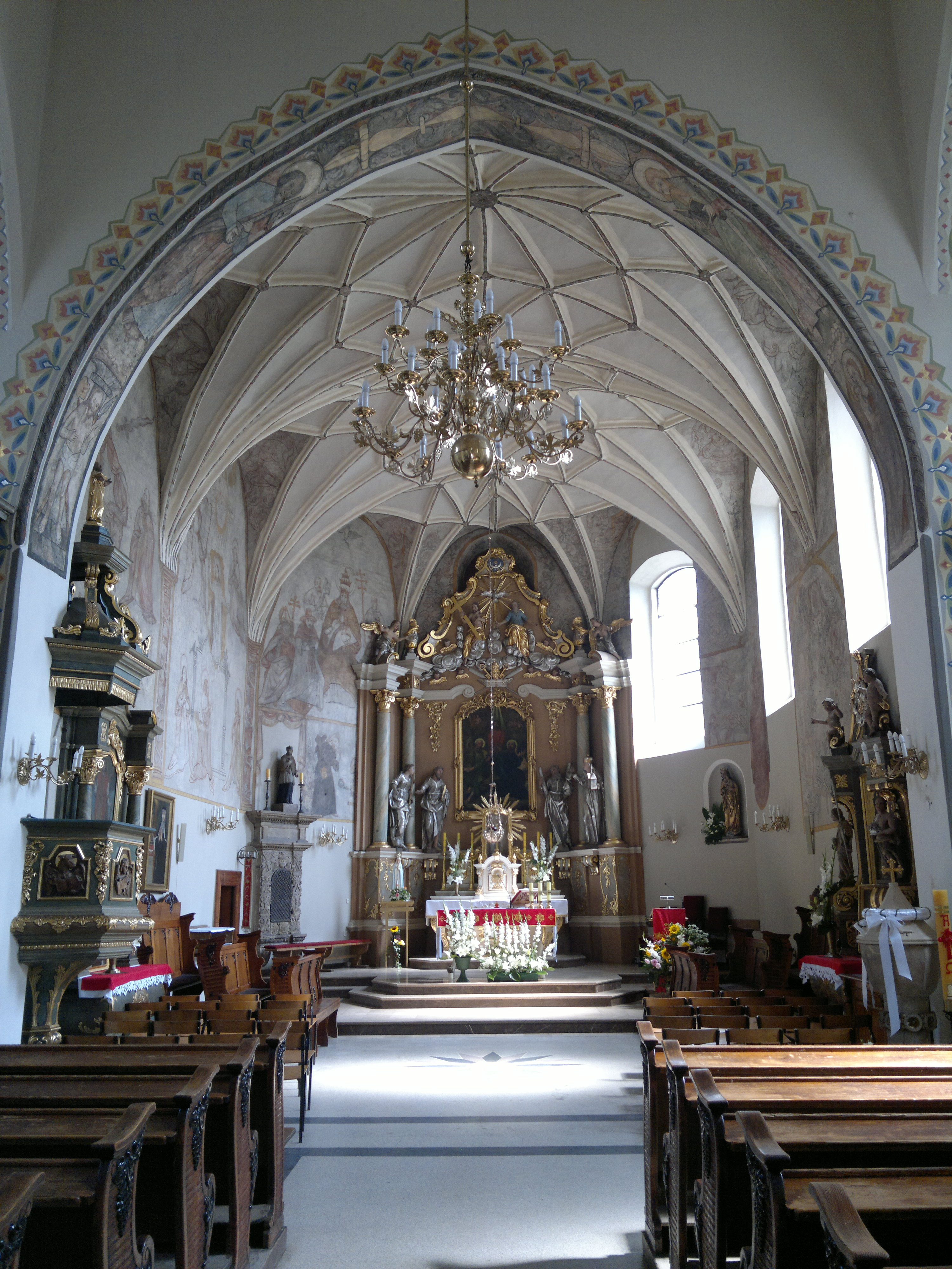 Nawa główna, prezbiterium i ołtarz kościoła pw. św. App. Piotra i Pawła w Kostrzynie